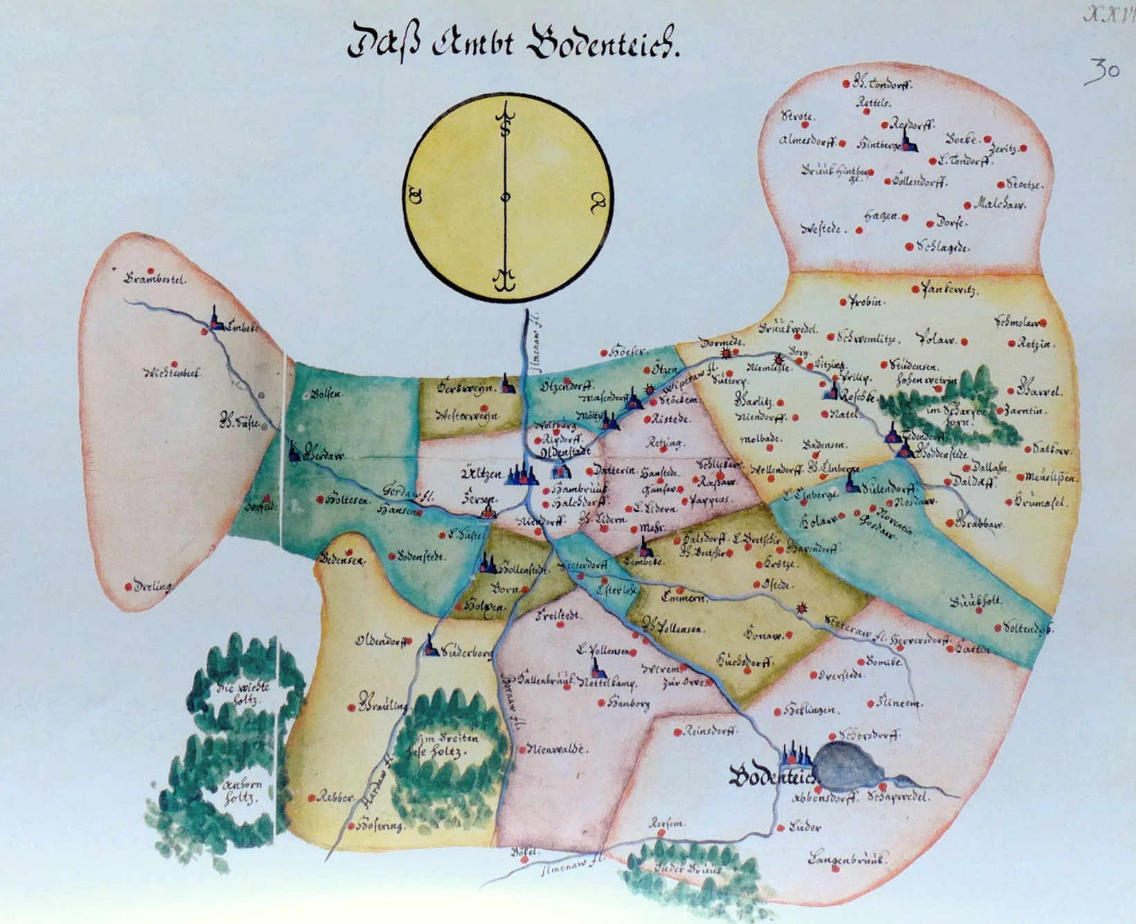 Ämteratlas des Fürstentums Lüneburg von Johannes Mellinger, um 1600 – Reproduktion der im Niedersächsischen Landesarchiv, Abteilung Hannover, lagernden Kopie um 1678 (vgl.